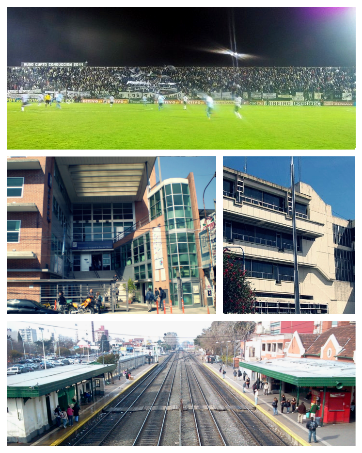 Partido de Tres de Febrero, Provincia de Buenos Aires, Argentina